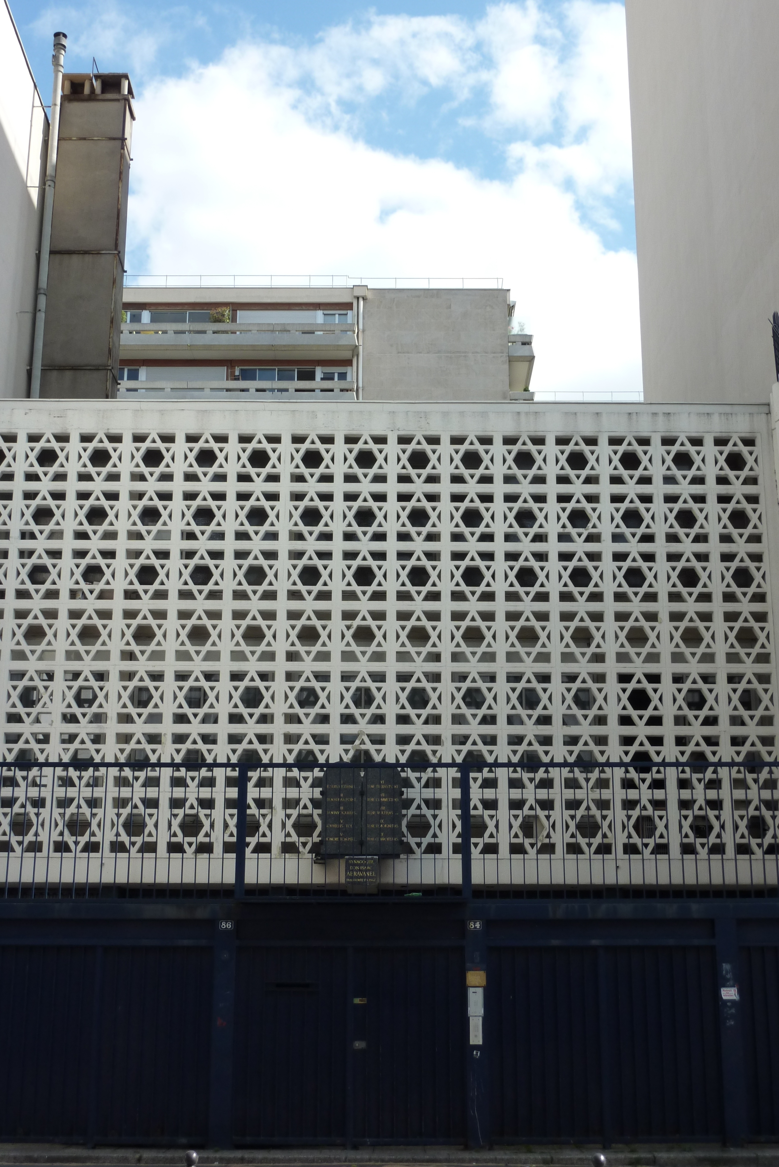 Synagoge der Rue de la Roquette, Synagogue Don Isaac Abravanel, 84/86, rue de la Roquette im 11. Arrondissement von Paris